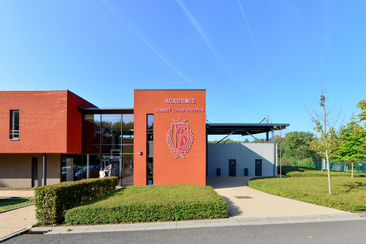 Façade du bâtiment principal de l'académie Robert Louis-Dreyfus à Liège